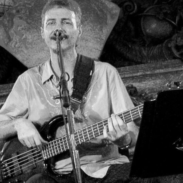 Foto oficial del bajista argentino Pedro Aznar en la Casa Rosada (Ciudad de Buenos Aires, Argentina), el 6 de mayo de 2005.